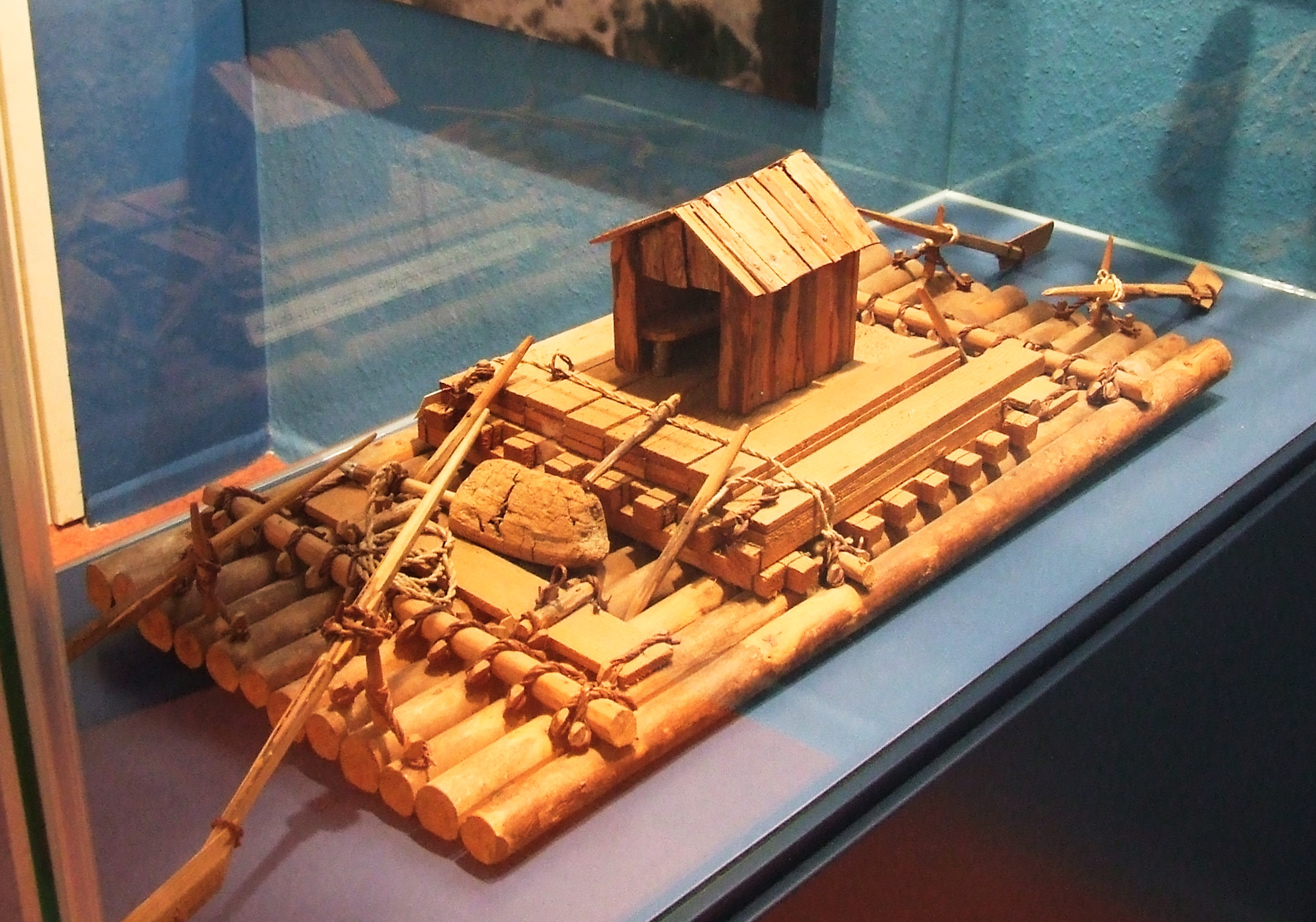 Modell eines Lech-Floßes im Naturmuseum Königsbrunn.